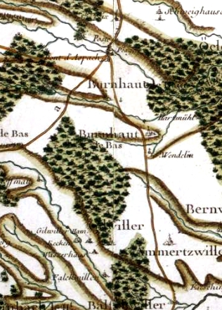 Carte Casini de Burnhaupt-le-Bas